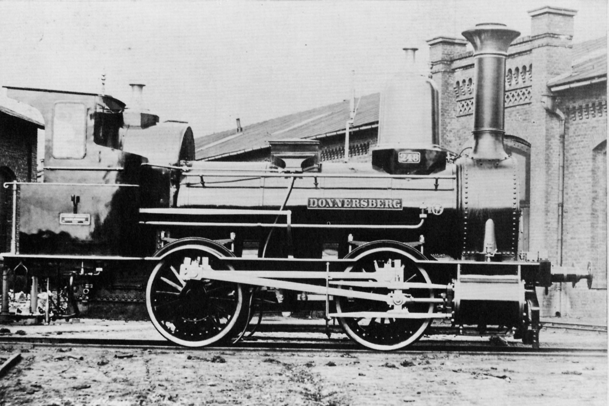 Deutscher Photograph um 1870: Lokomotive »Donnersberg«